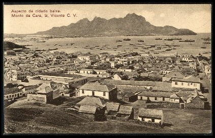 Postal Antigo; São Vicente, Cabo Verde: Aspecto da cidade baixa. Monte da Cara, S. Vicente C.V.